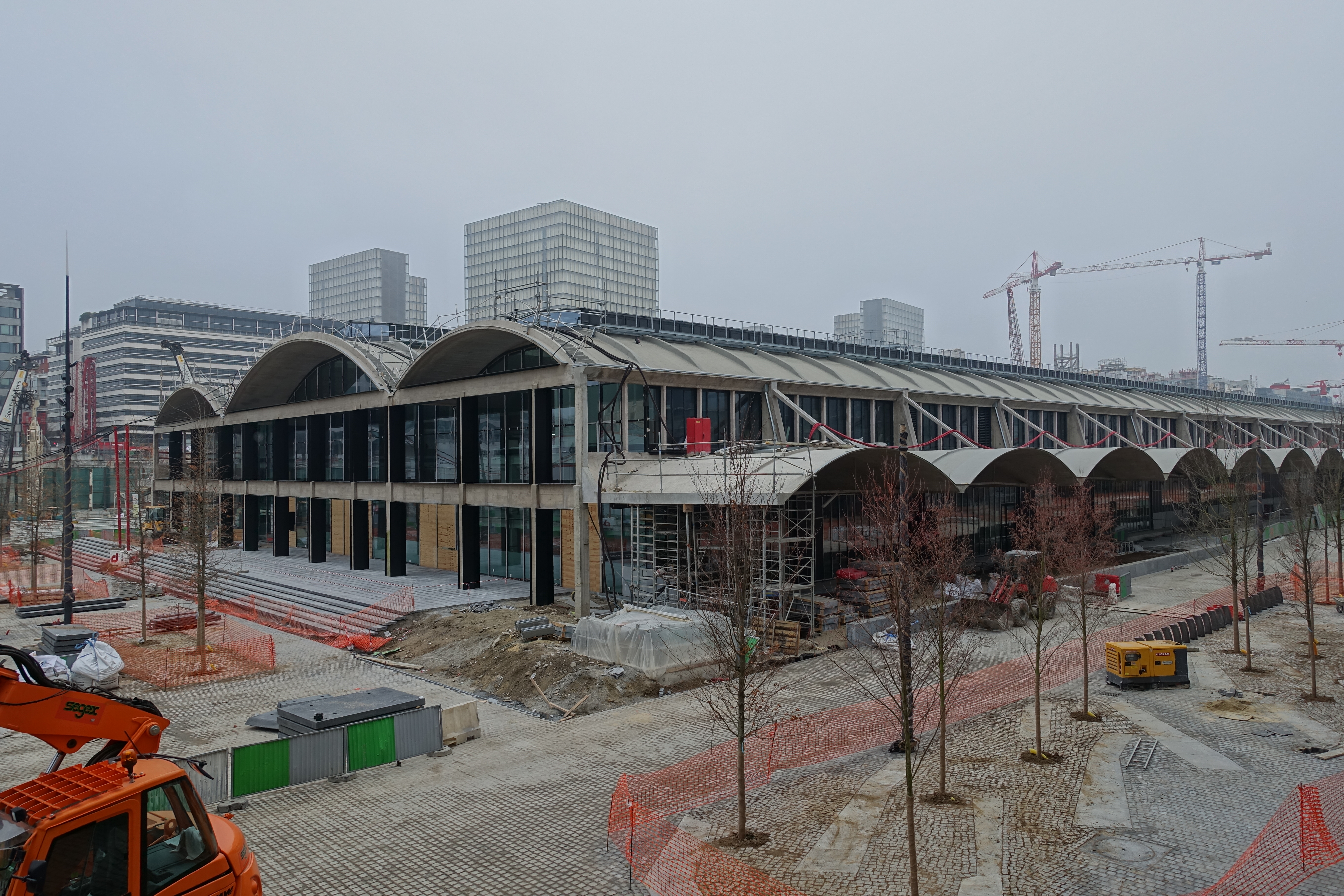 Halles Freyssinet @ Paris